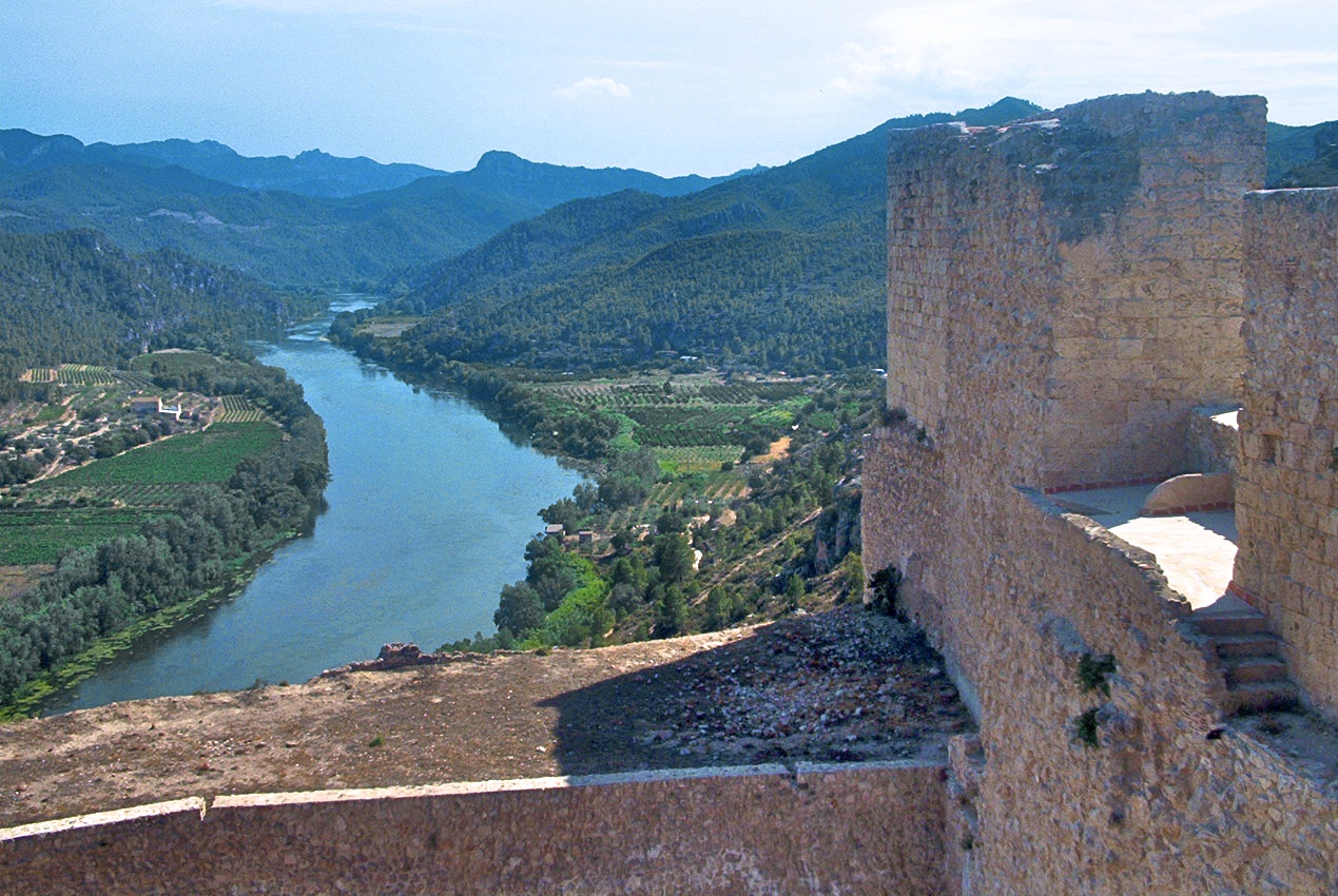 Riu Ebre des del castell de Miravet